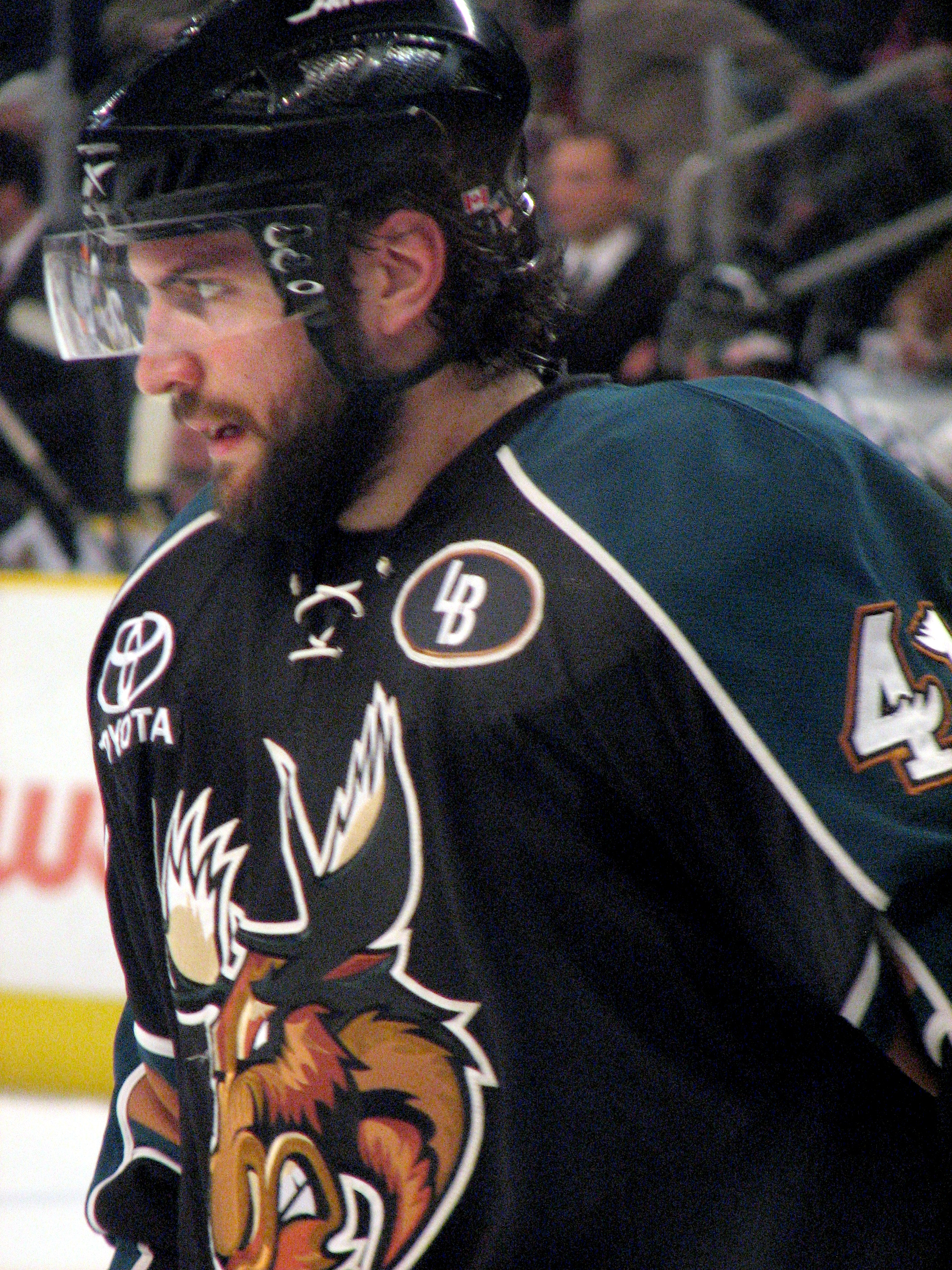 #41 Guillaume Desbiens, Manitoba Moose